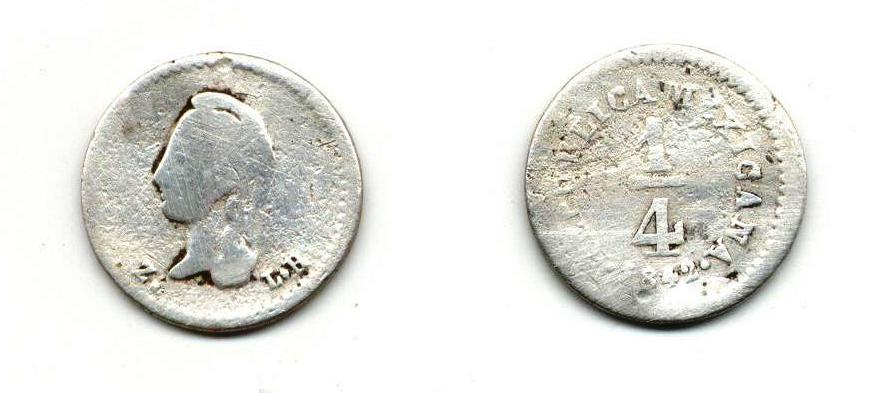 Moneda de 1/4 de real acuñada en la ceca de Zacatecas en 1842.